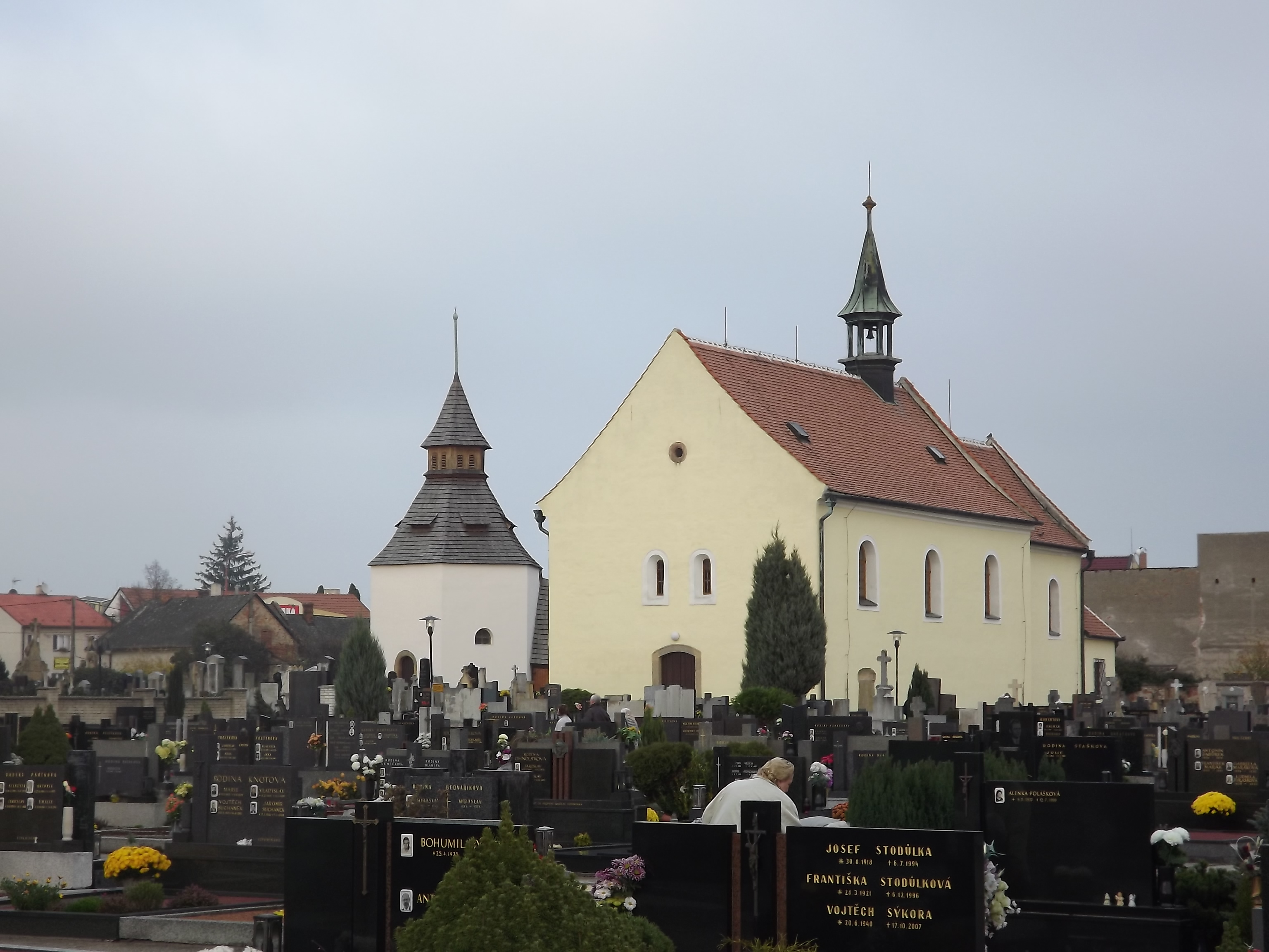 Kostel sv. Michala a sv. Jana křtitele, Staré Město